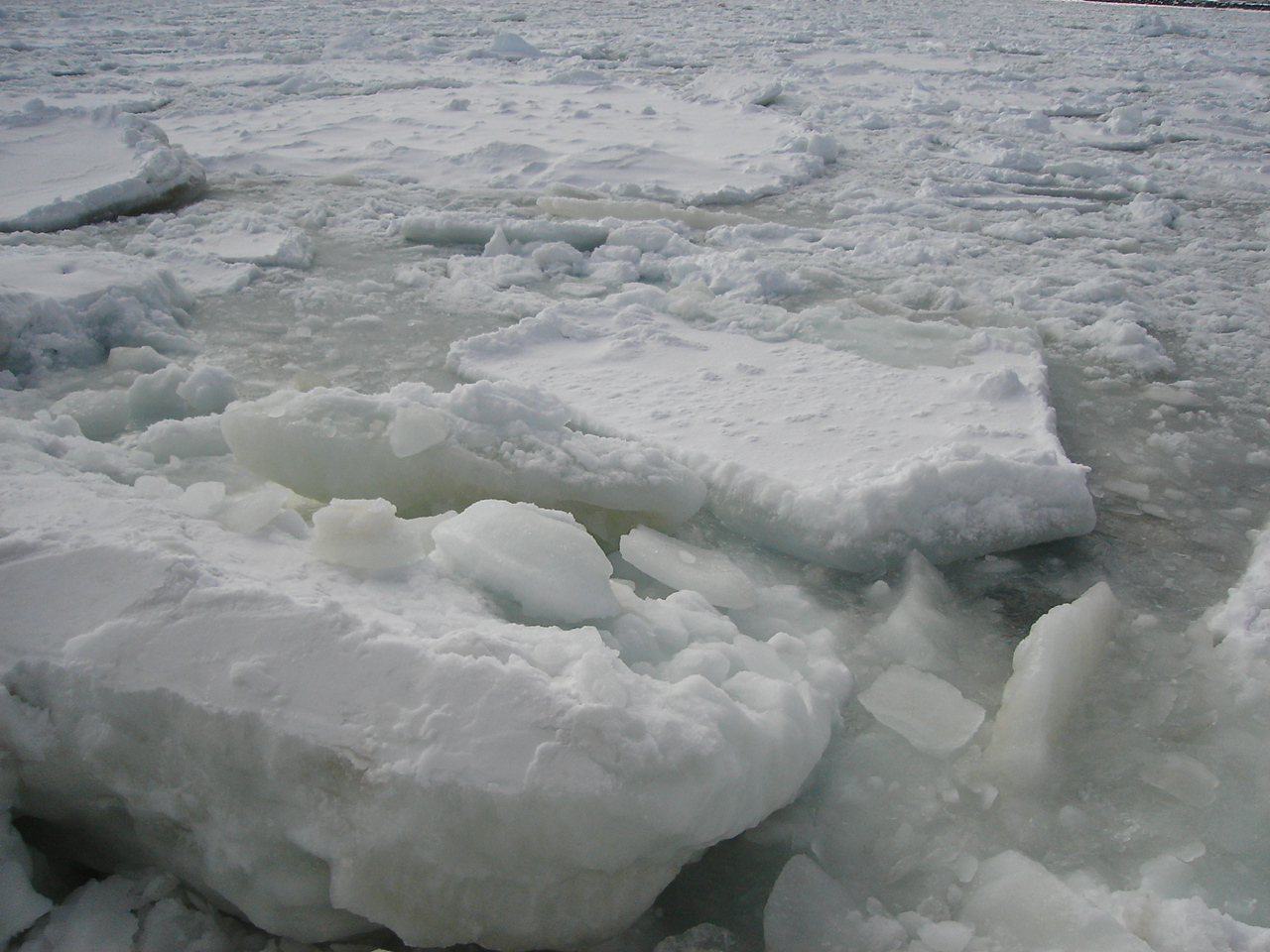 Ryuhyoh